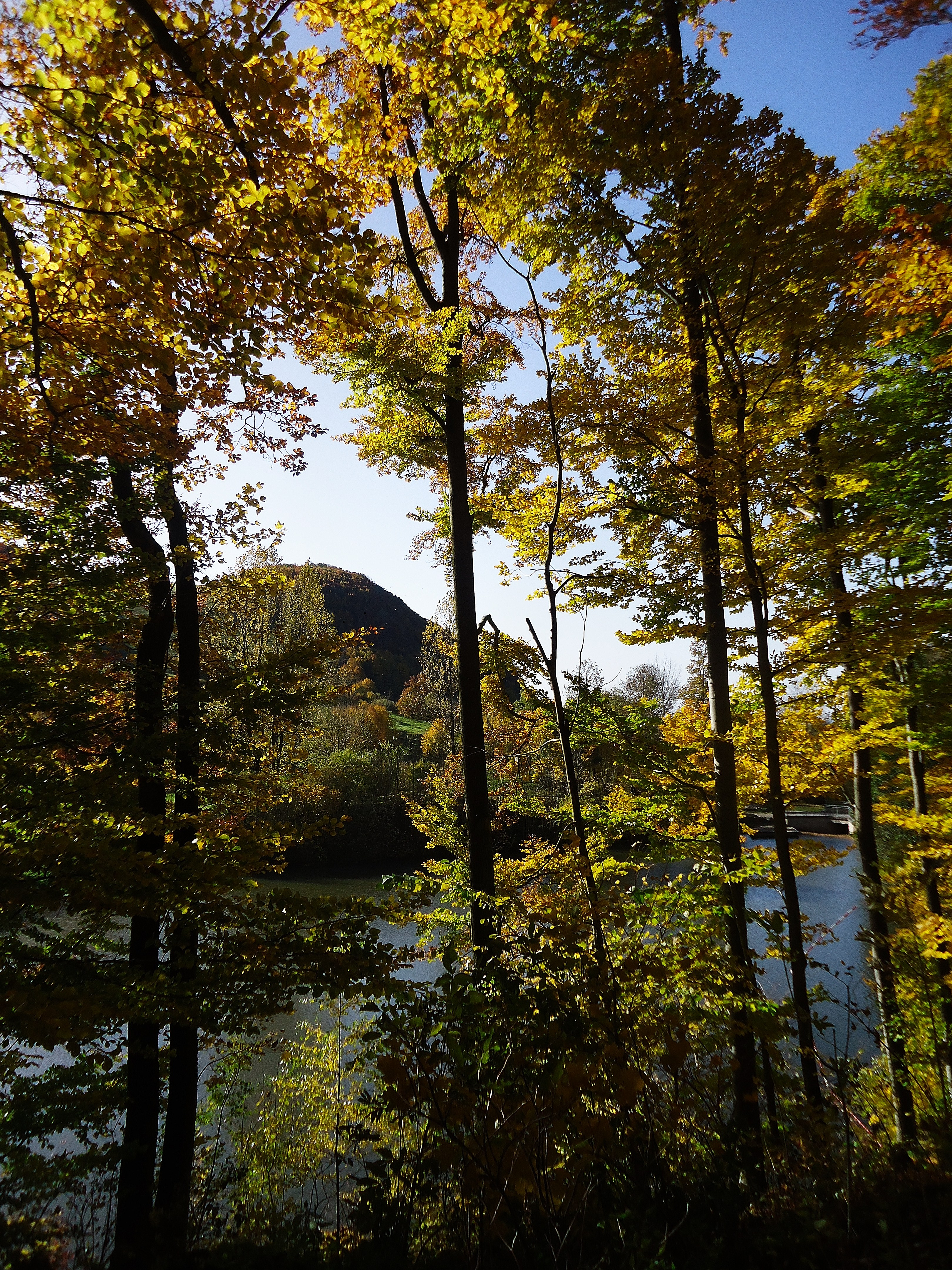 Goldener Oktober Rhön Blick auf den Guckeisee 19.10.2012